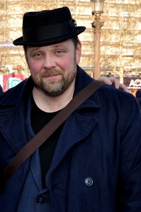 Grégory Gadebois au déjeuner des nommés des César du cinéma